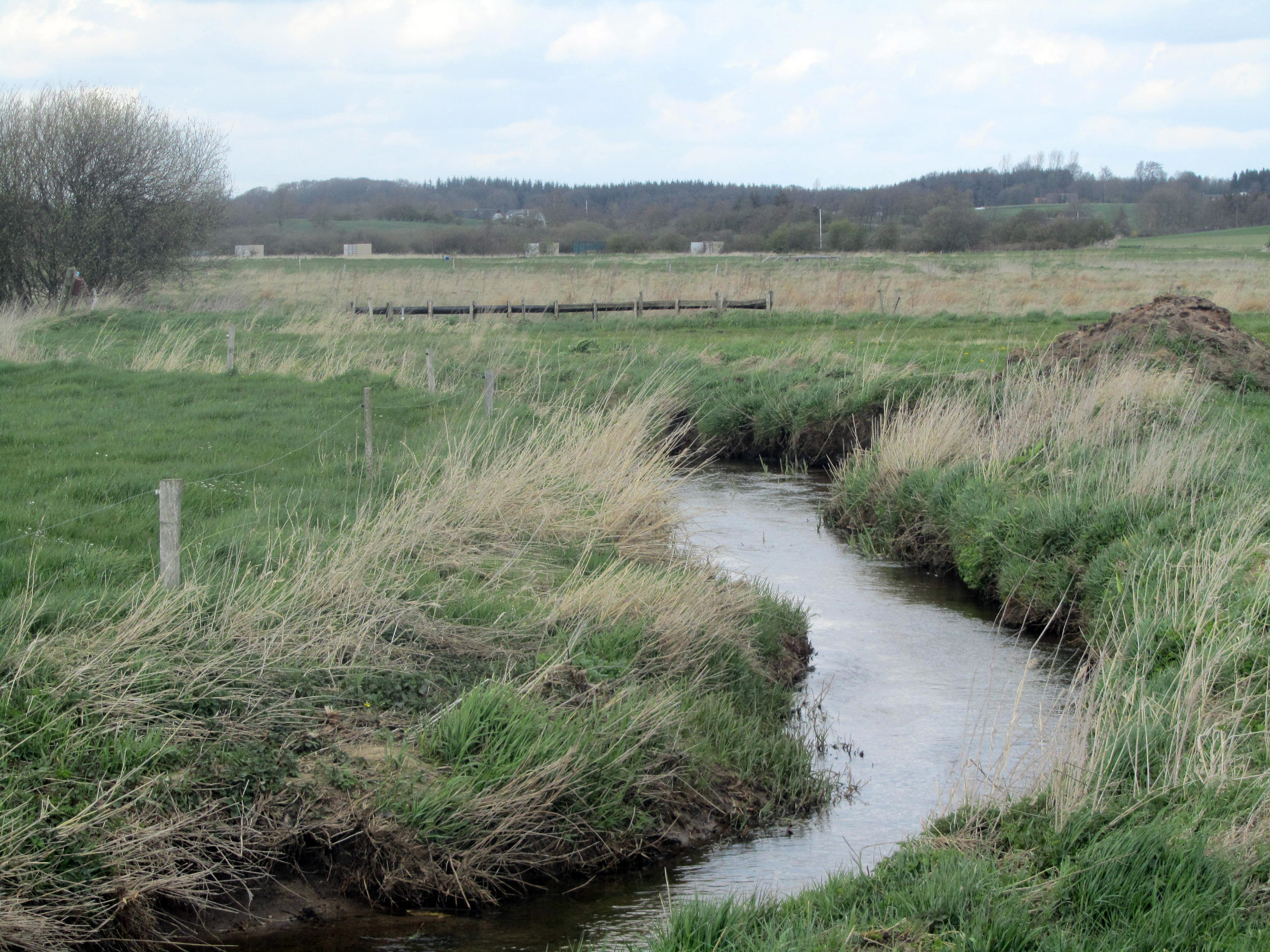 Uldum Kær set mod nord ved Lilleåen